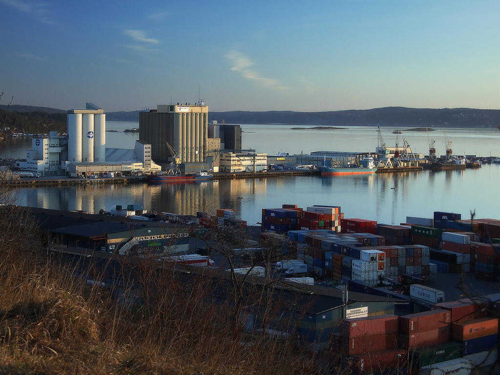 Shot taken from Ekeberg shortly before sunset.